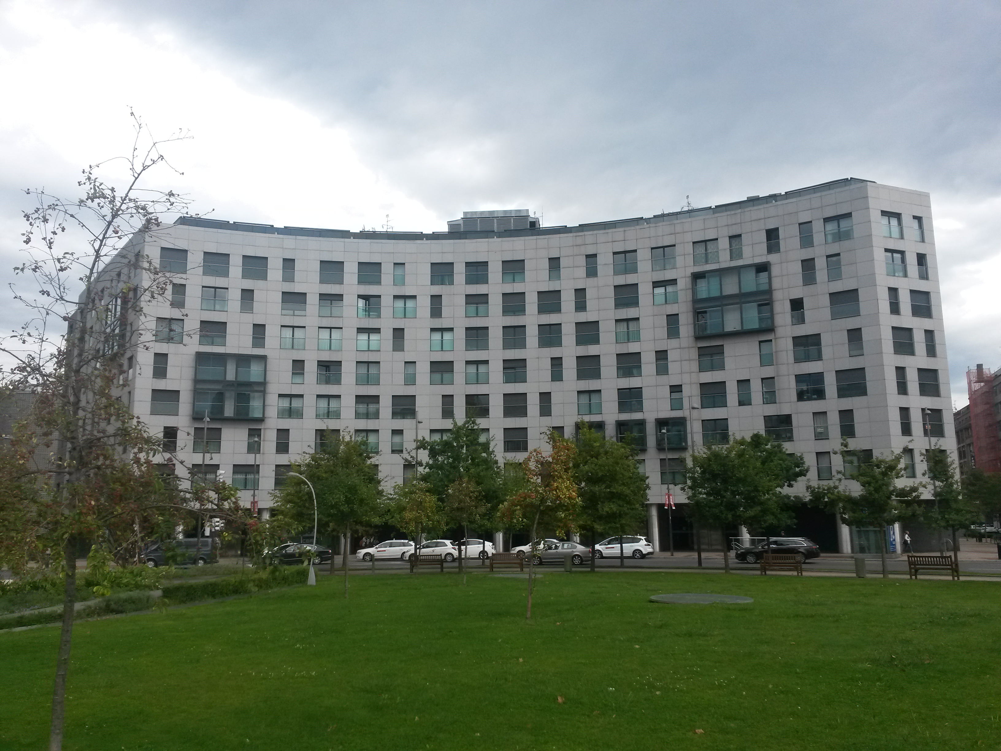 Bloque de viviendas Aguinaga desde la plaza Euskadi, Bilbao.